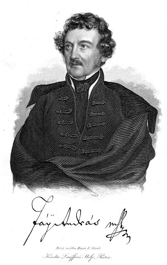 Fáy András arcképe